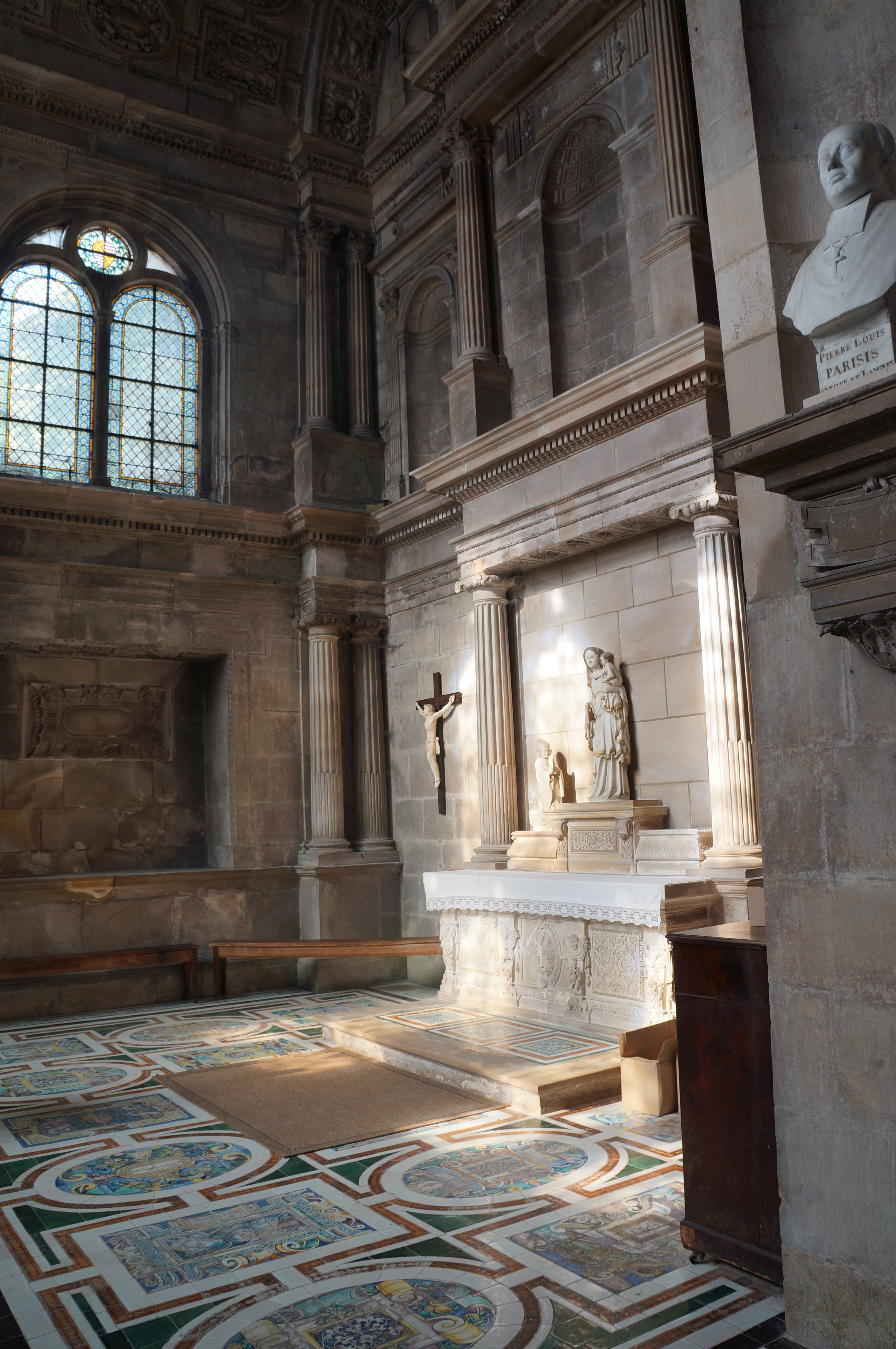 Édifiée entre 1547 et 1551 : sol en carreaux de faïence de Rouen, classé en tant qu'objet monument historique.